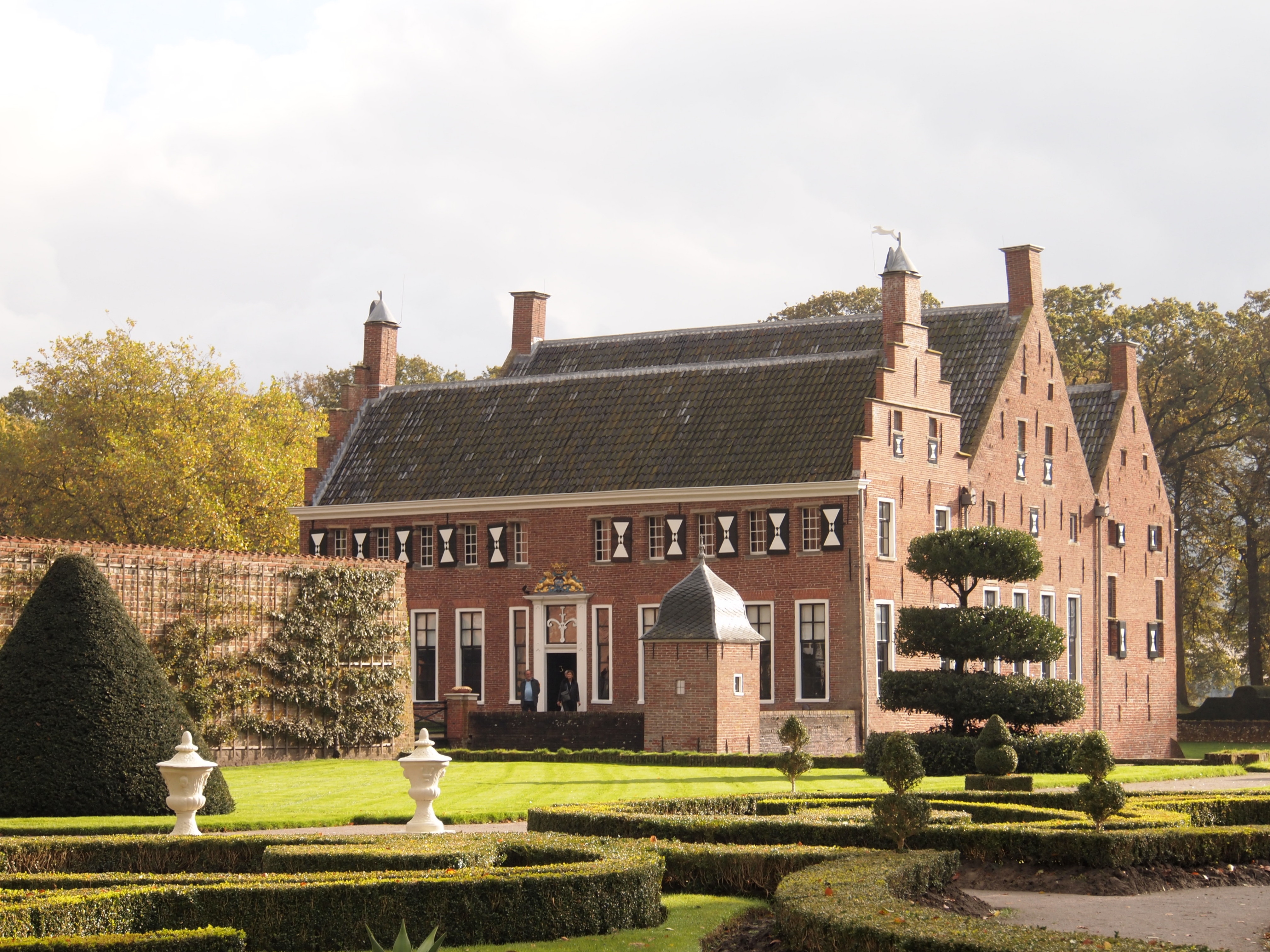 Uithuizen, Menkemaborg, tuinaanleg